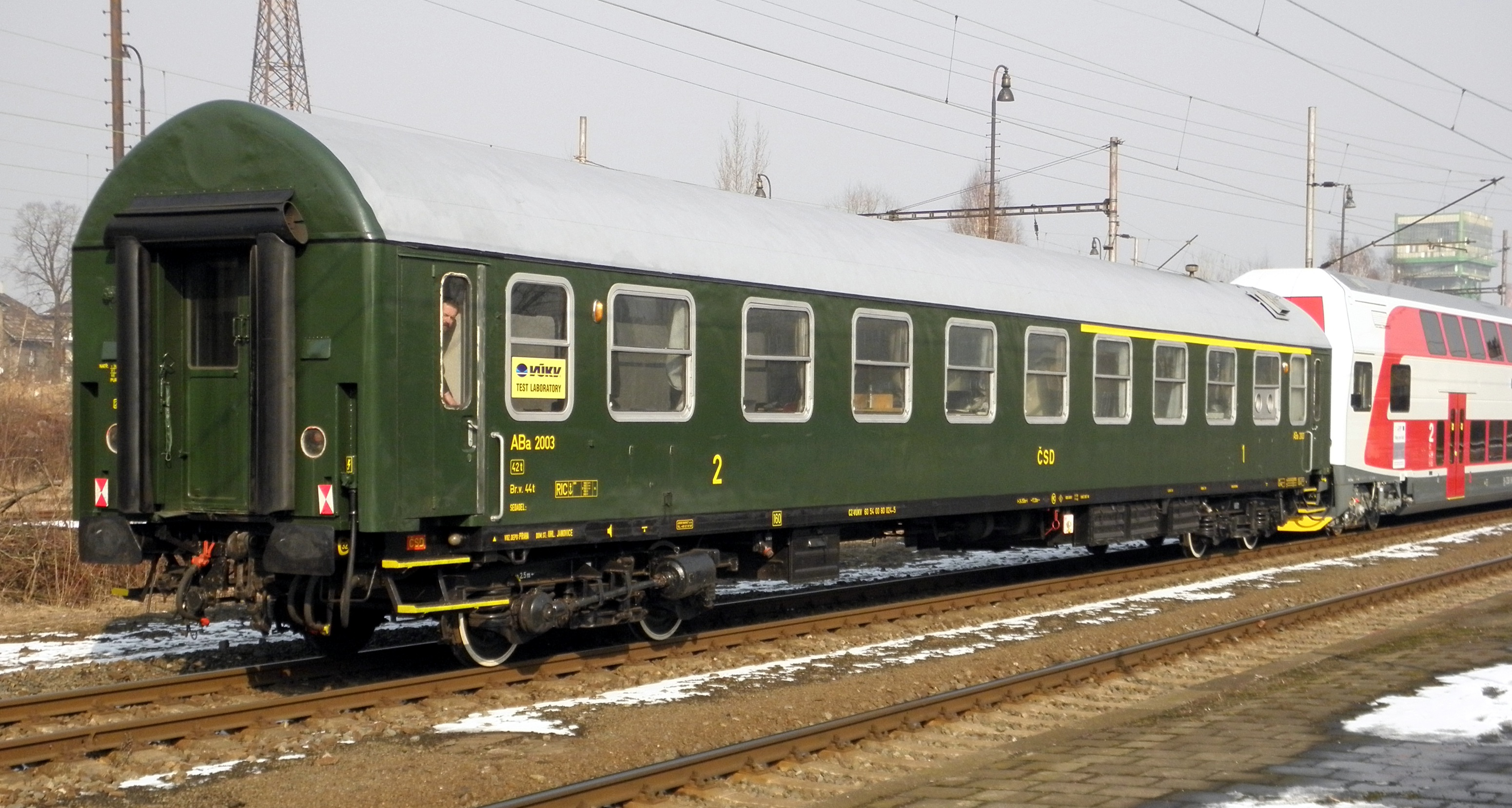 Osobní vůz ABa 2003, pocházející ze série prvních 5 dodaných kusů, v historizujícím nátěru. Majitel Juniormarket s.r.o., Uhlířské Janovice. Žst. Ostrava-Vítkovice.